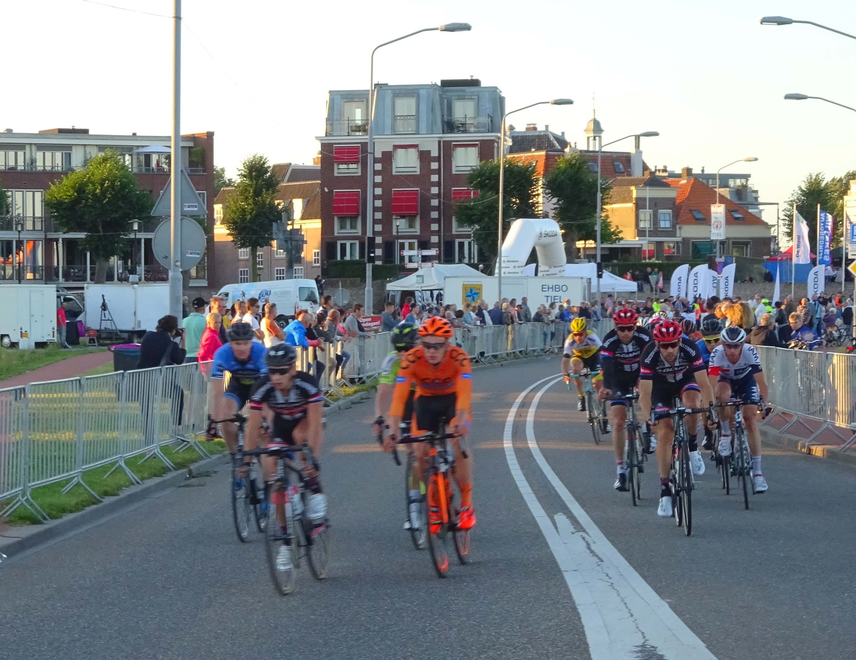 Profronde van Tiel 2016, kopgroep op de Waalkade